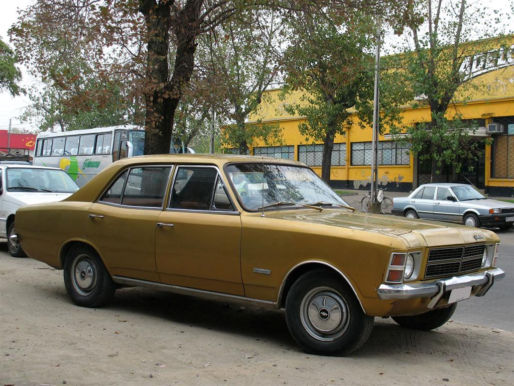 Chevrolet Opala Deluxe Sedan 1978